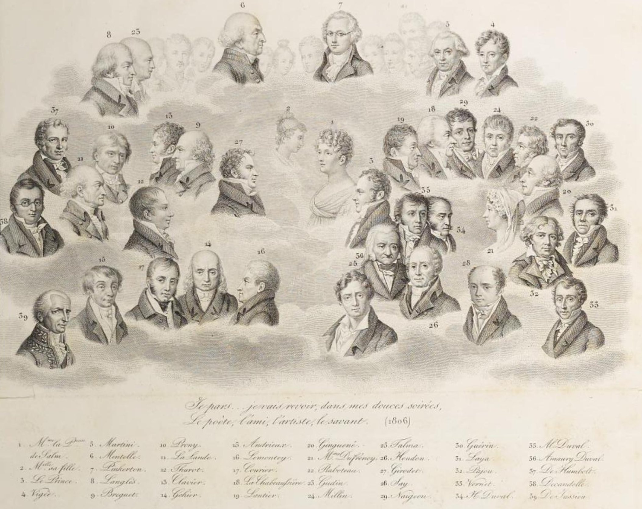 Une soirée chez la princesse Constance de Salm en 1806, gravure d'Ambroise Tardieu d'après un dessin d'Antoine Chazal, tirée du tome deuxième des Œuvres complètes de madame la princesse Constance de Salm (exemplaire conservé par la Southern Regional Library Facility de l'Université de Californie)